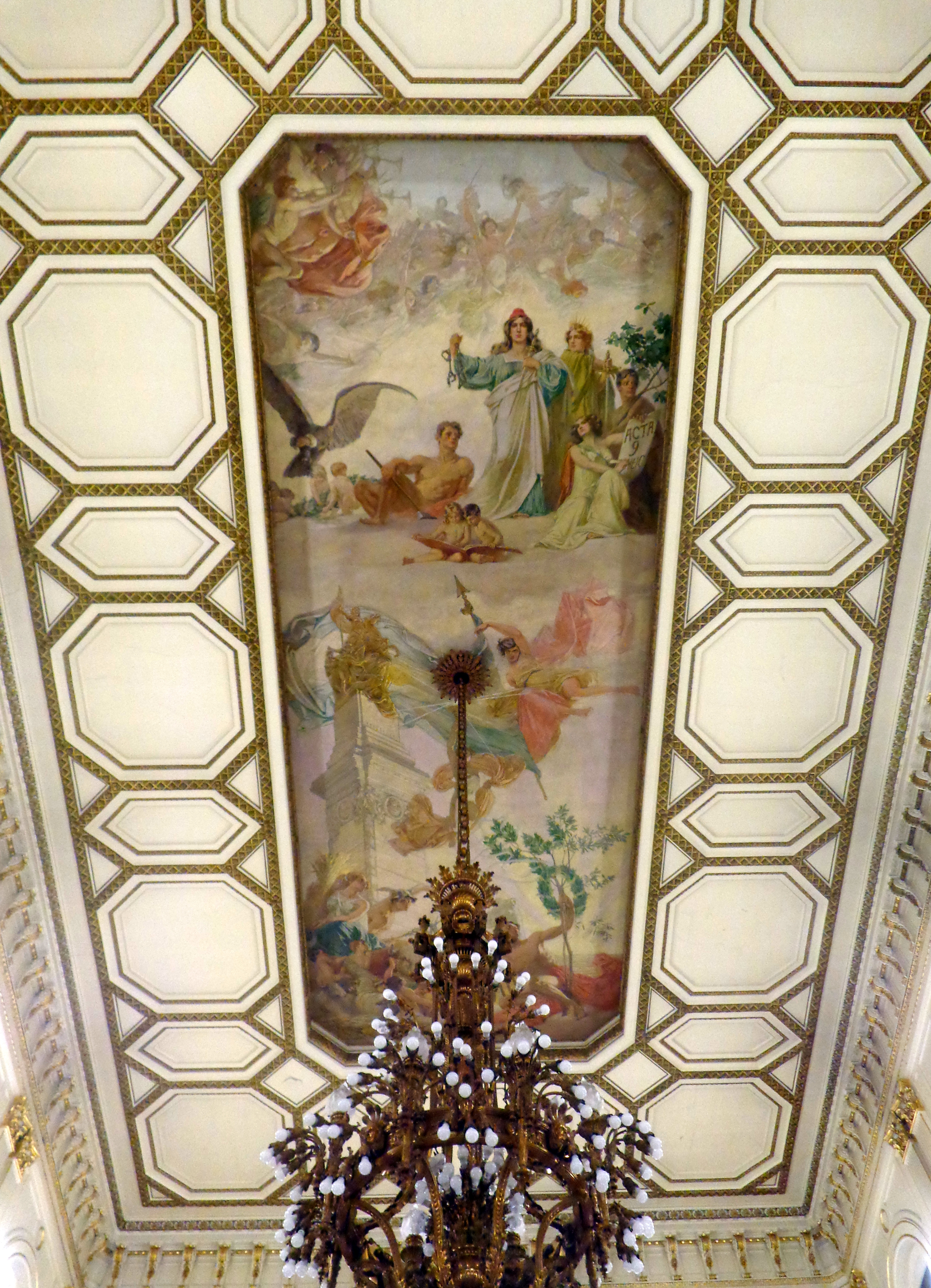 Salón Blanco en la Casa Rosada, edificio del poder ejecutivo de la Nación Argentina. Techo pintado por Luigi De Servi (Luis De Servi) (1863-1945)